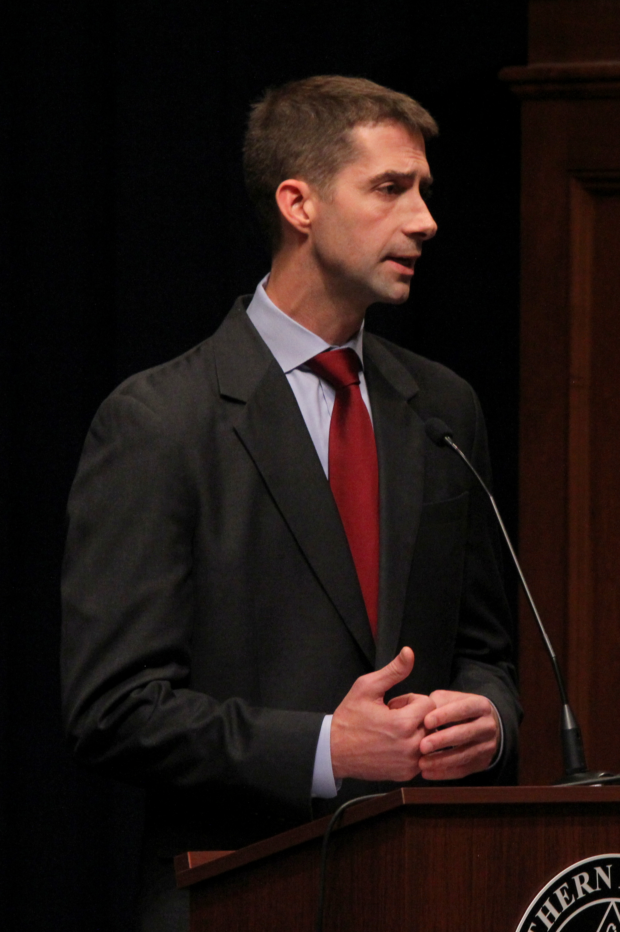 Debate 10.4.12